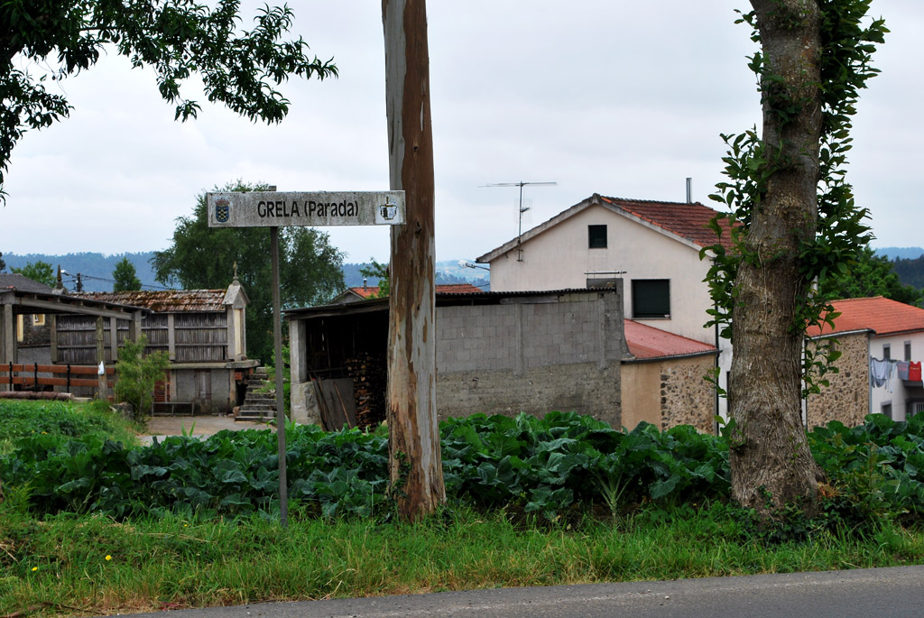 Cartel Agrela Parada Ordes